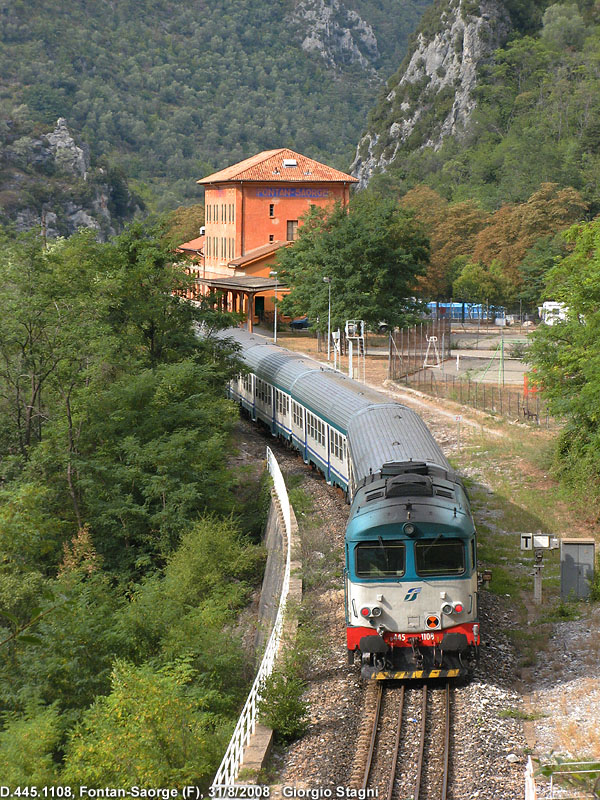 Stazione ferroviaria di Fontan-Saorge. In arrivo un treno diretto Oneglia-Torino spinto da una locomotiva D.445.